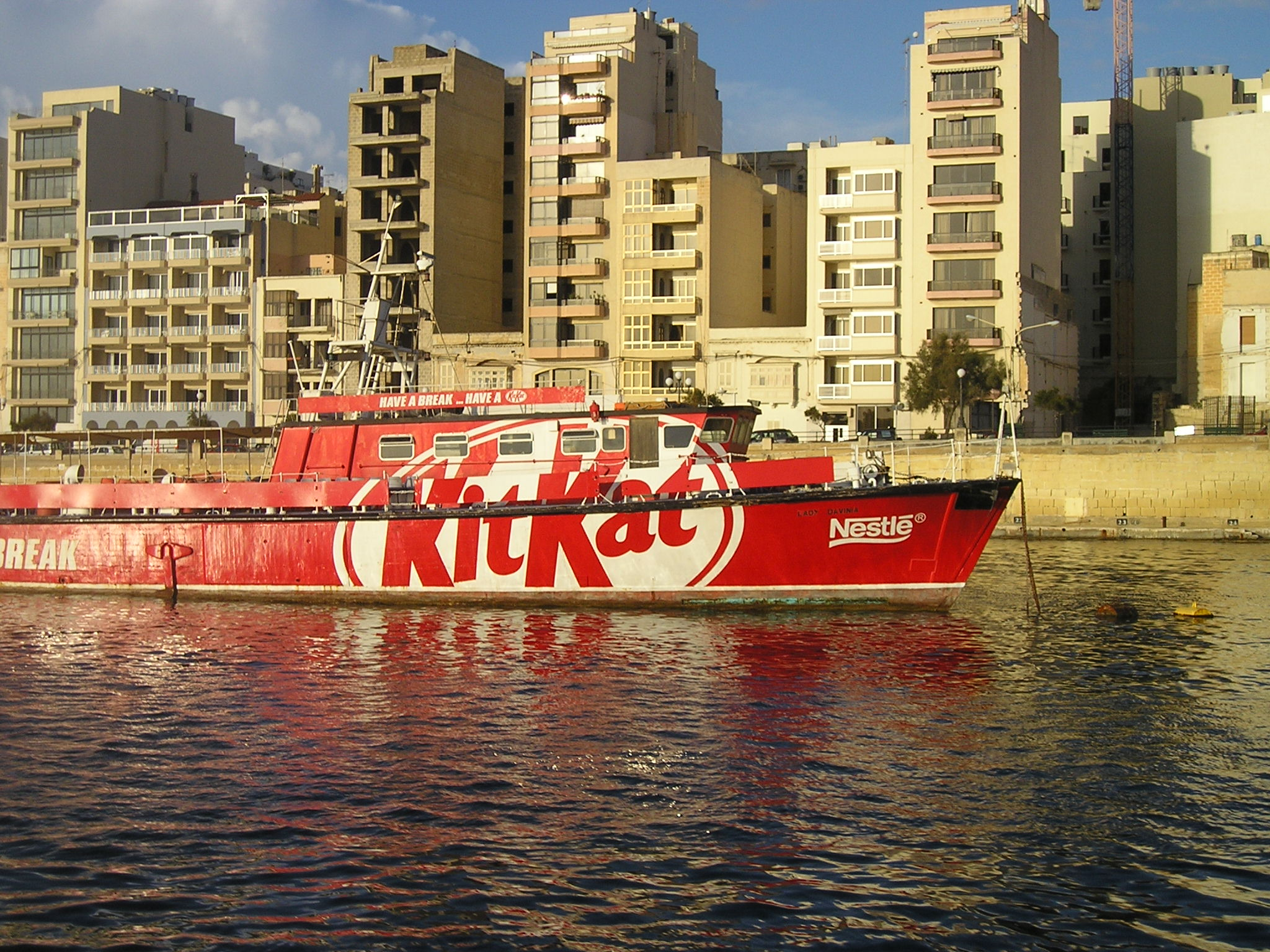 Un tableau de HMS Greetham.